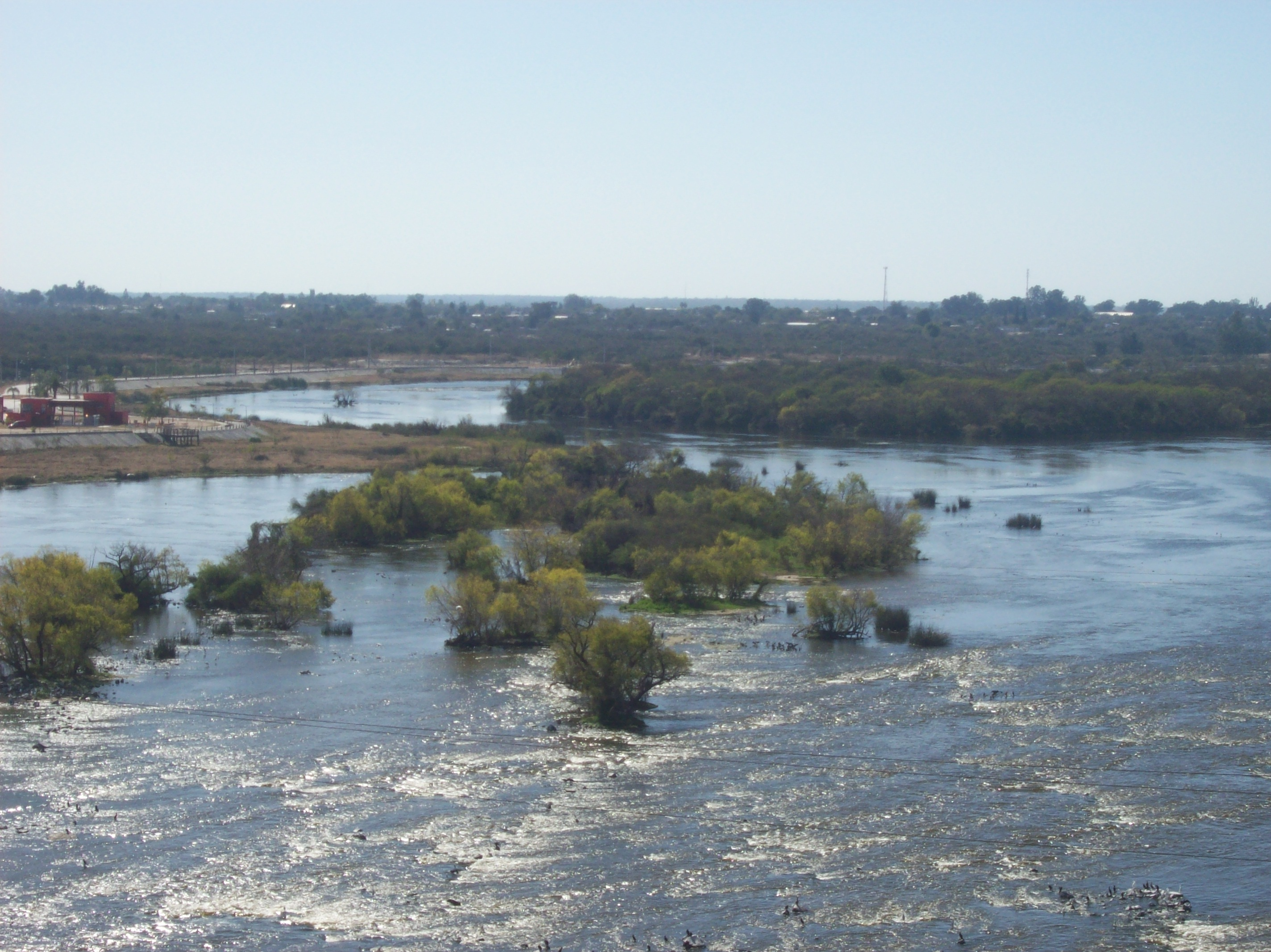 Río Dulce en Termas de Río Hondo, Provincia de Santiago del Estero, Argentina.